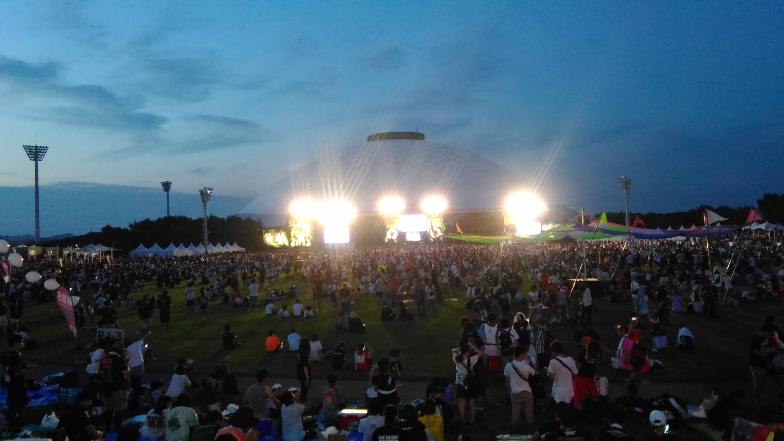 WILD BUNCH FEST.2017の様子